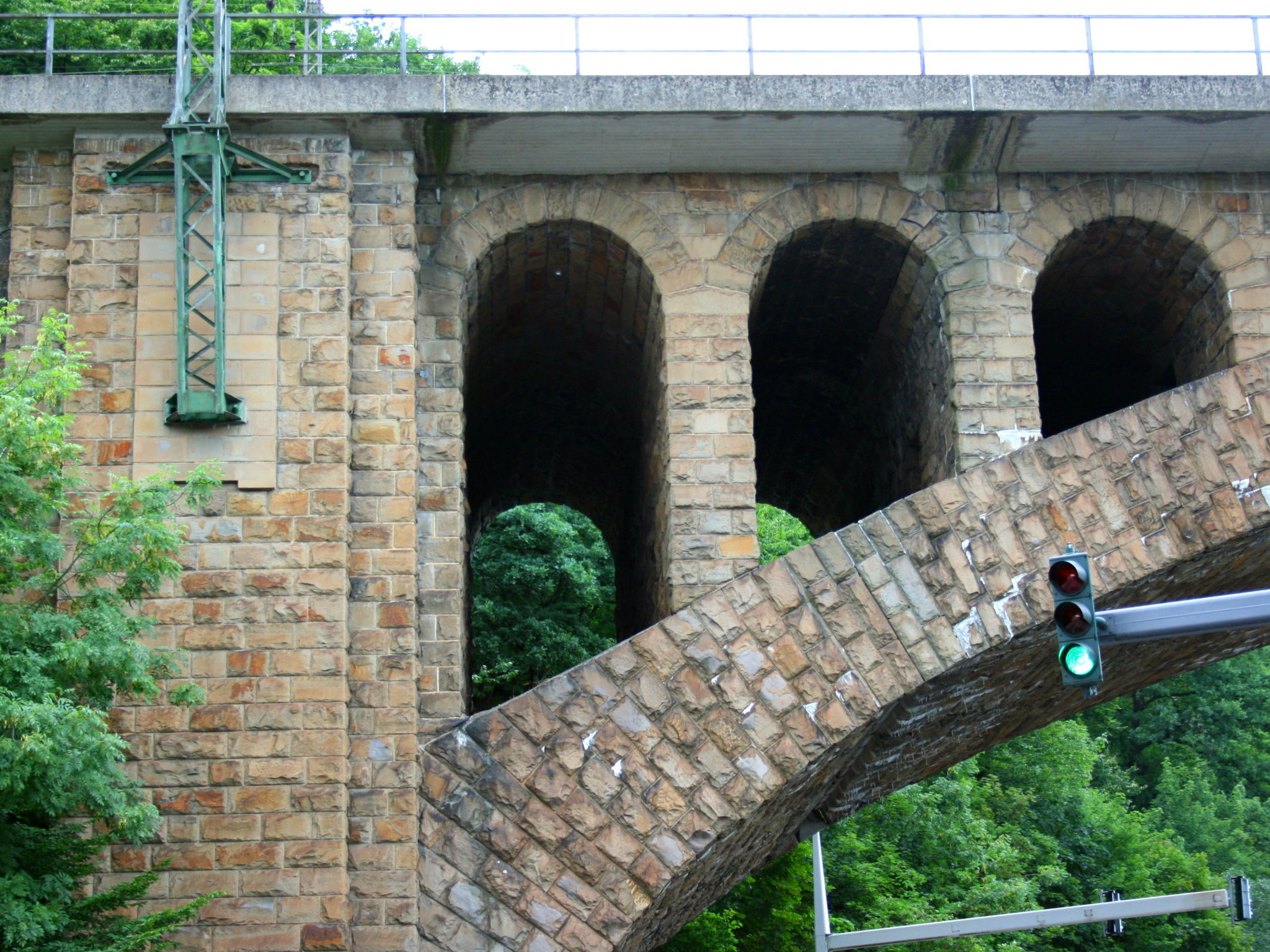 Sonnborner Eisenbahnbrücke über die Wupper in Wuppertal